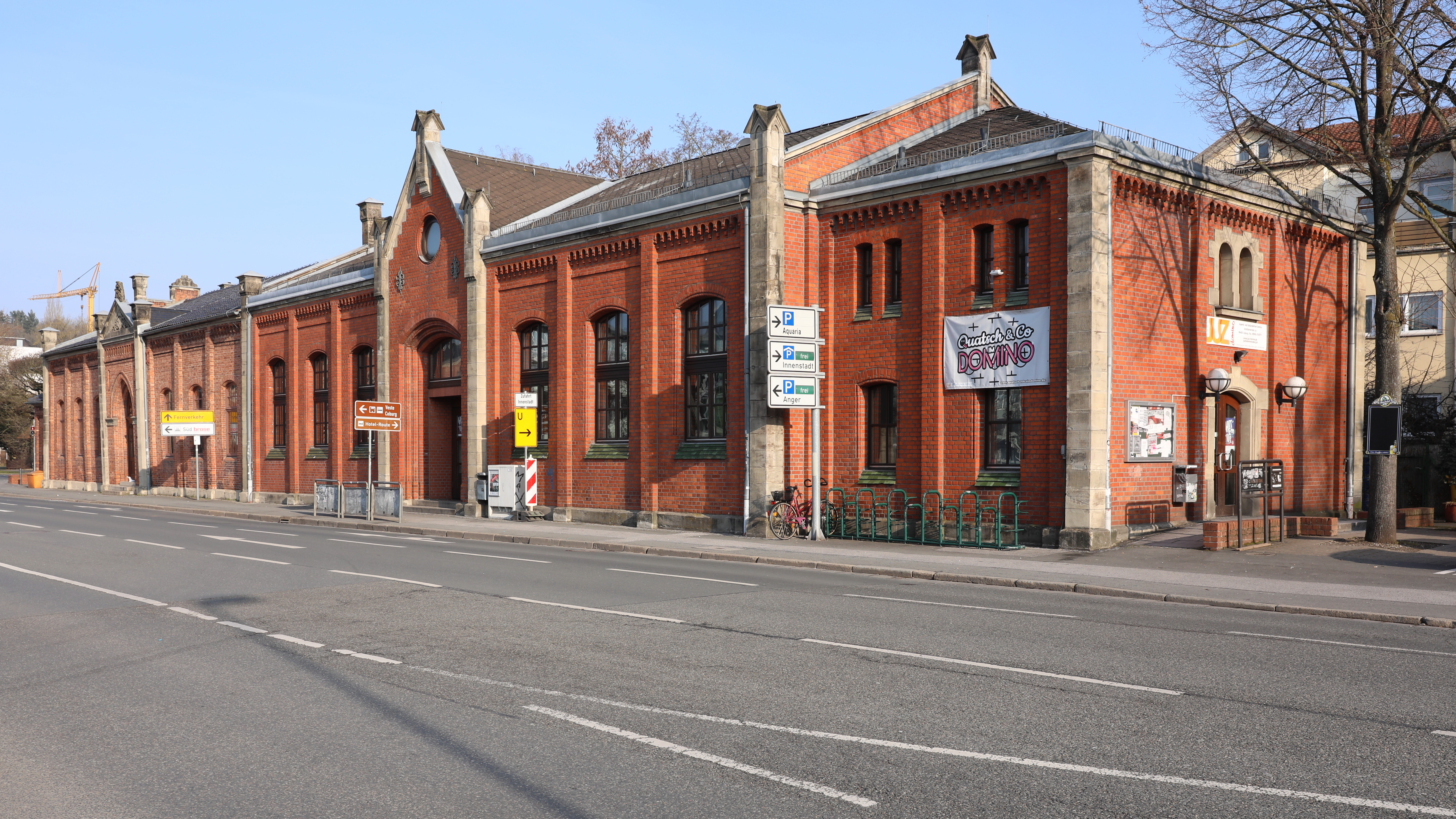 Coburg, Schützenstraße 1a/2 (Angerturnhallen)